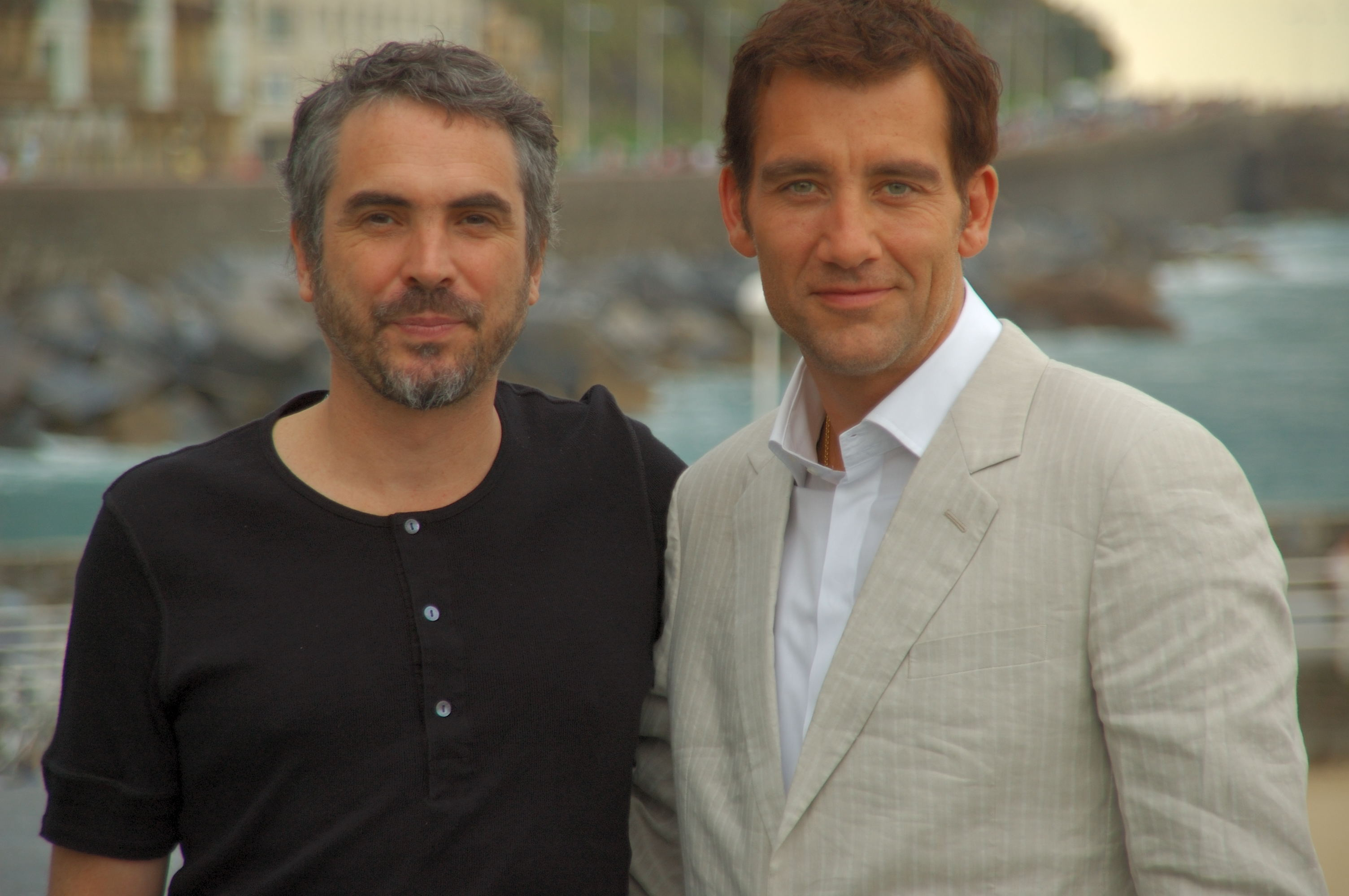 Visitad el blog del Zinemaldi en